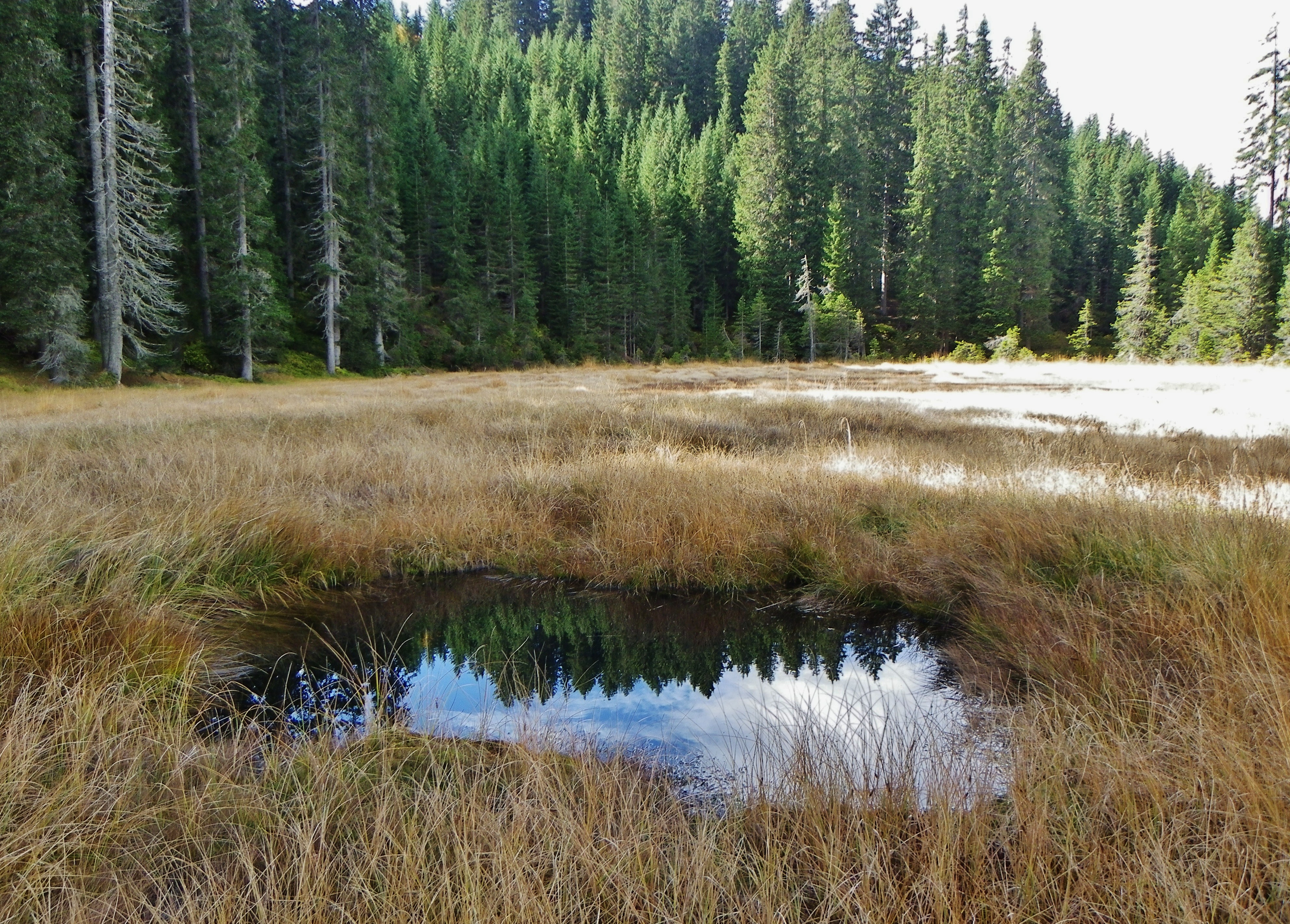 Palù di Canzenagol (TN) - "occhio" della torbiera